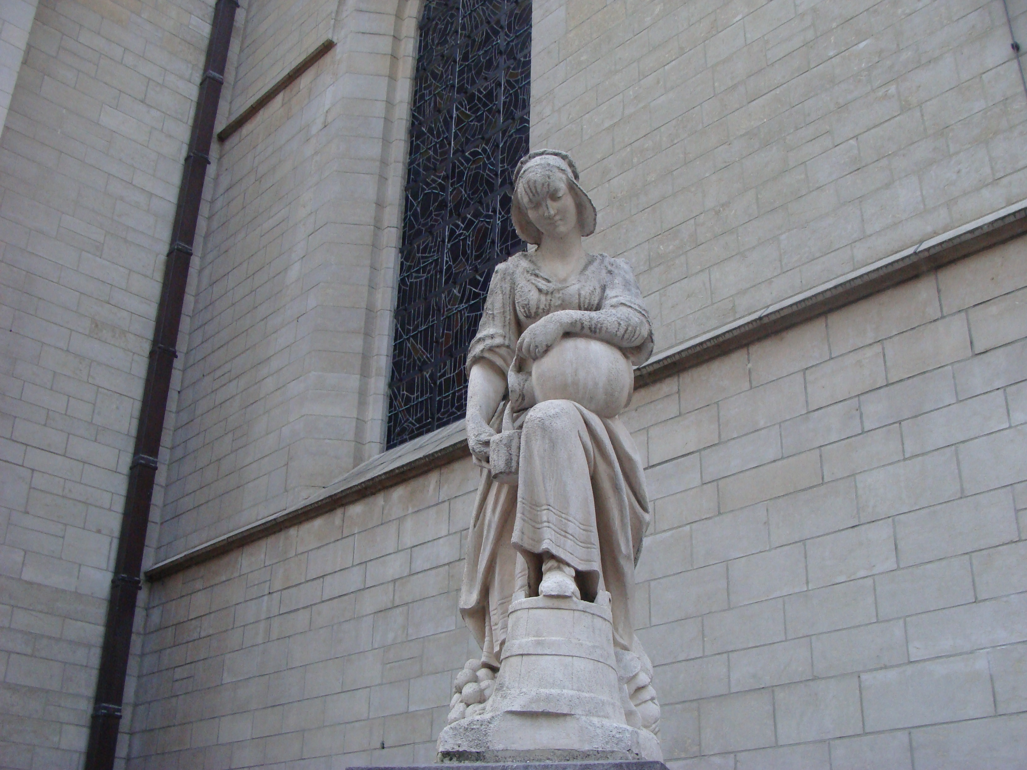 Μάρκους ντε Βος: "Η μικρή γαλακτοπώλης του Αγίου Νικολάου", Βρυξέλλες 2011.